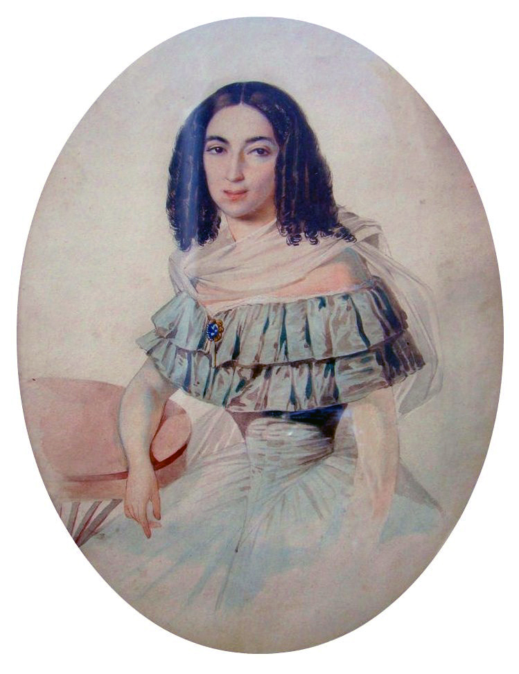 Княгиня Анна Георгиевна Толстая, ур. княжна Грузинская (1798-1889)